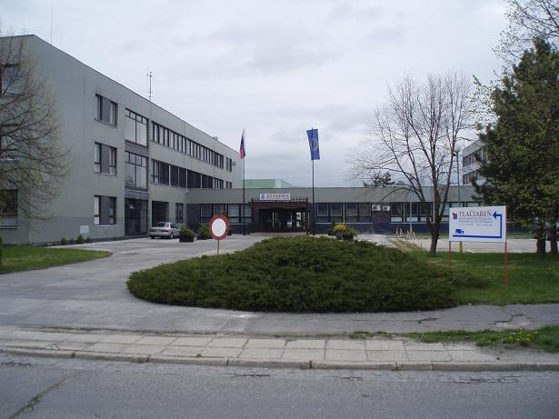 Akadémia PZ SR